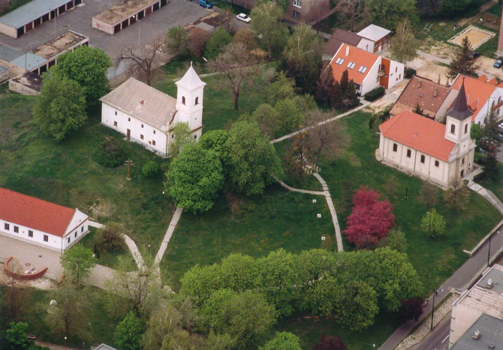 Evangélikus és református templomok, Ref. templom, késő barokk, 1783. Megújítva 1912-ben és 1938-ban. azonosító 9527 (törzsszám 4757). Veszprém m., Ajka, Kossuth u. - Evangélikus templom, késő barokk, 1786-1789. Táblás famennyezete és oszlopos fakarzata 1786-ból azonosító 9526 (törzsszám 4758). Veszprém megye, Ajka, Templomdomb, Kossuth u.